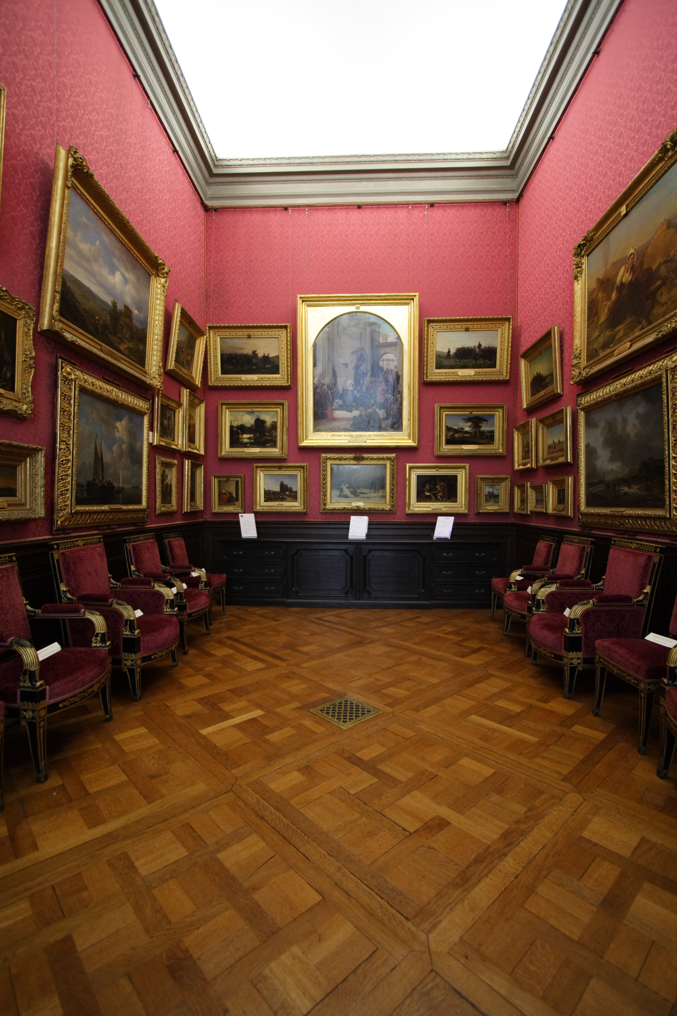 Salle Caroline, musée Condé (Chantilly, France)